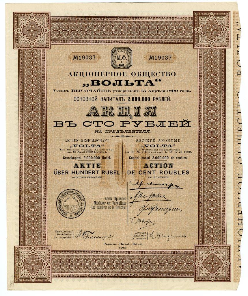 Акция в 100 руб. на предъявителя Акционерного общества "Вольта". Г. Ревель, 1913 г.